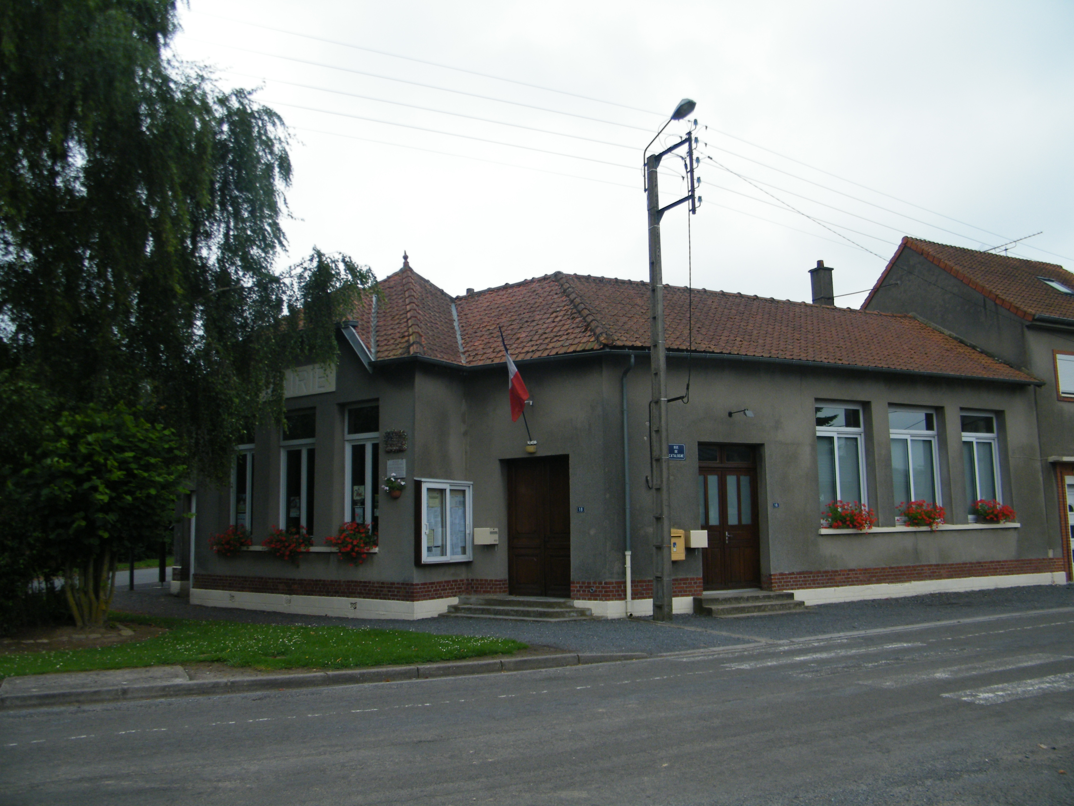 Mairie.